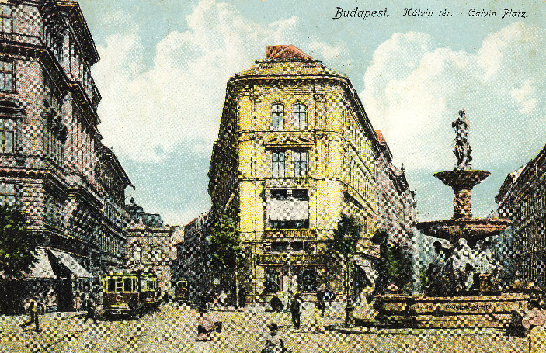 Budapest, Kálvin tér 1910. - Képeslap. A Danubius kút, a Baross utca és az Üllői út torkolata